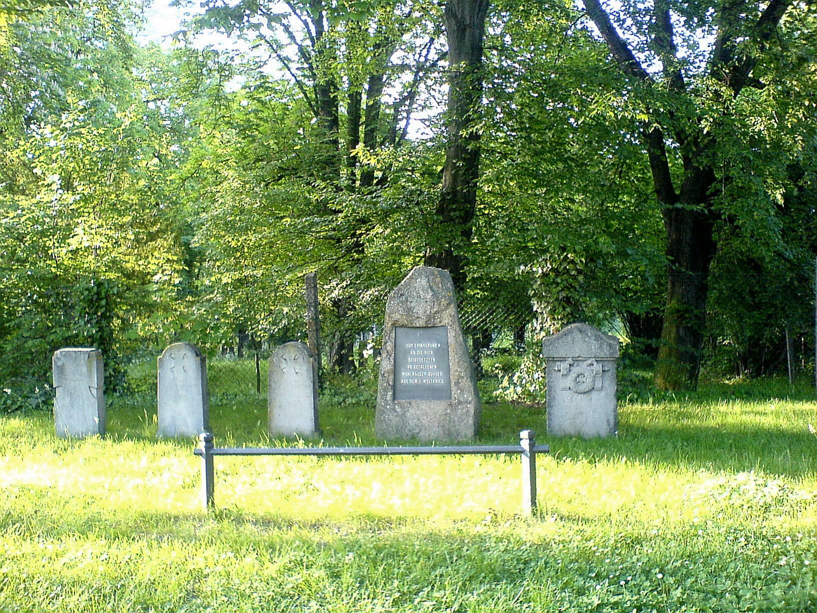 "Zu Erinnerung" verbesserte Version